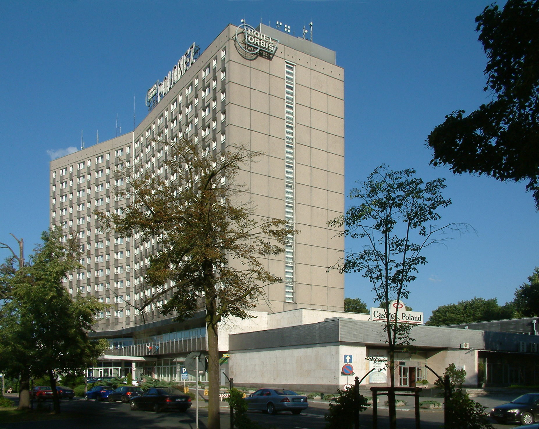 Hotel Polonez, Poznań